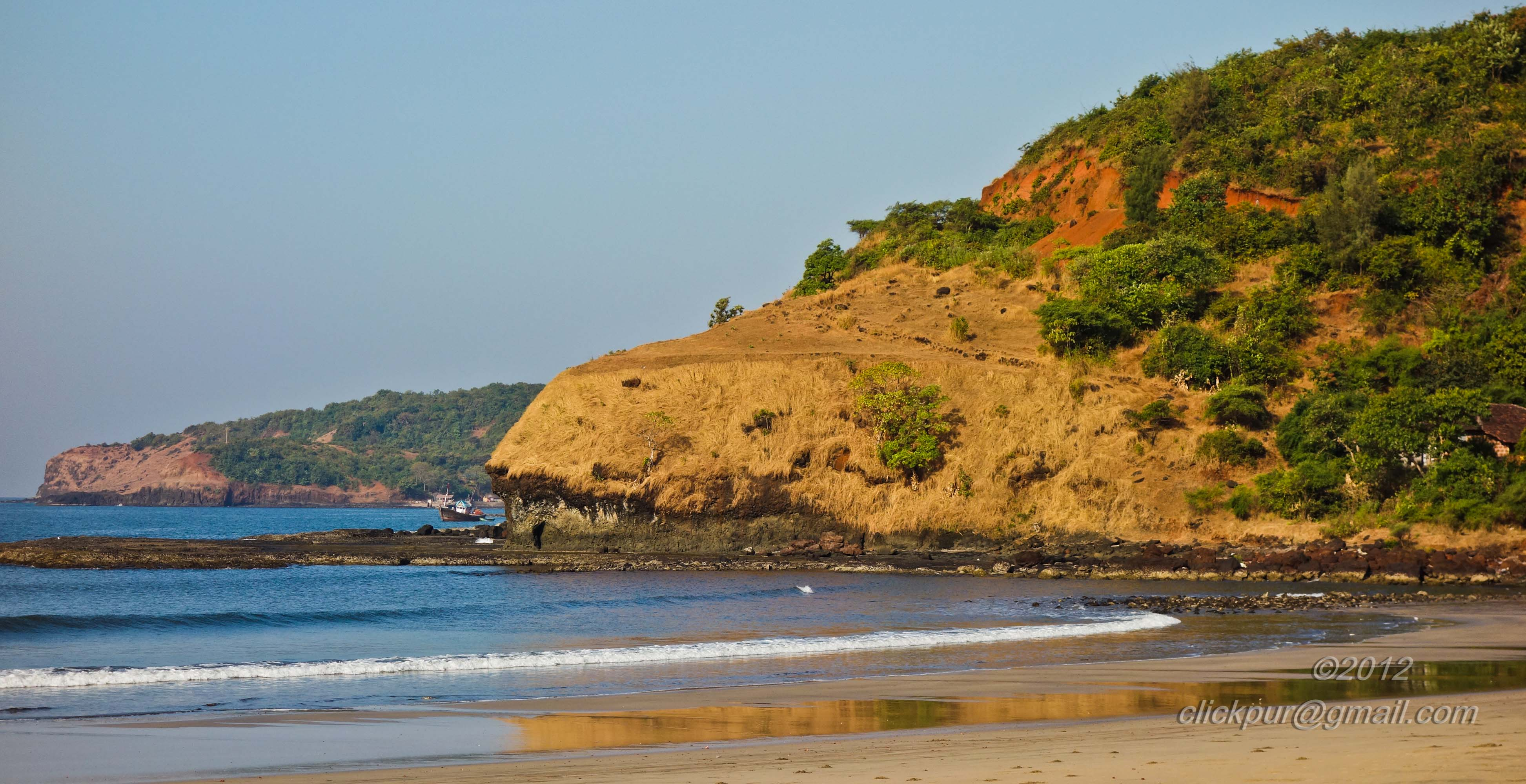 Ratnagiri, Velneshwar